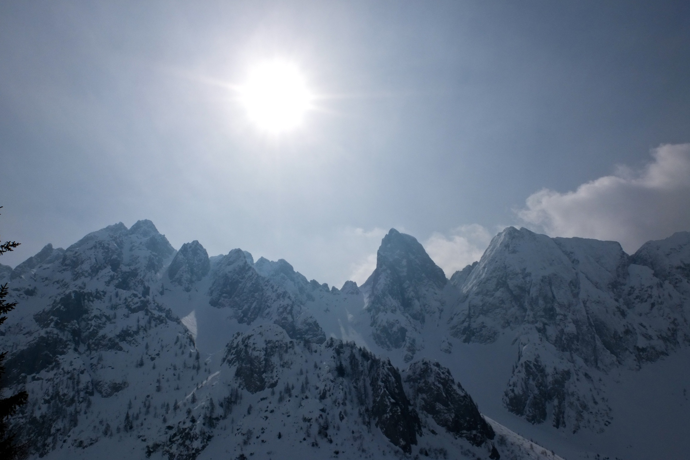 Cimon di Bagozza